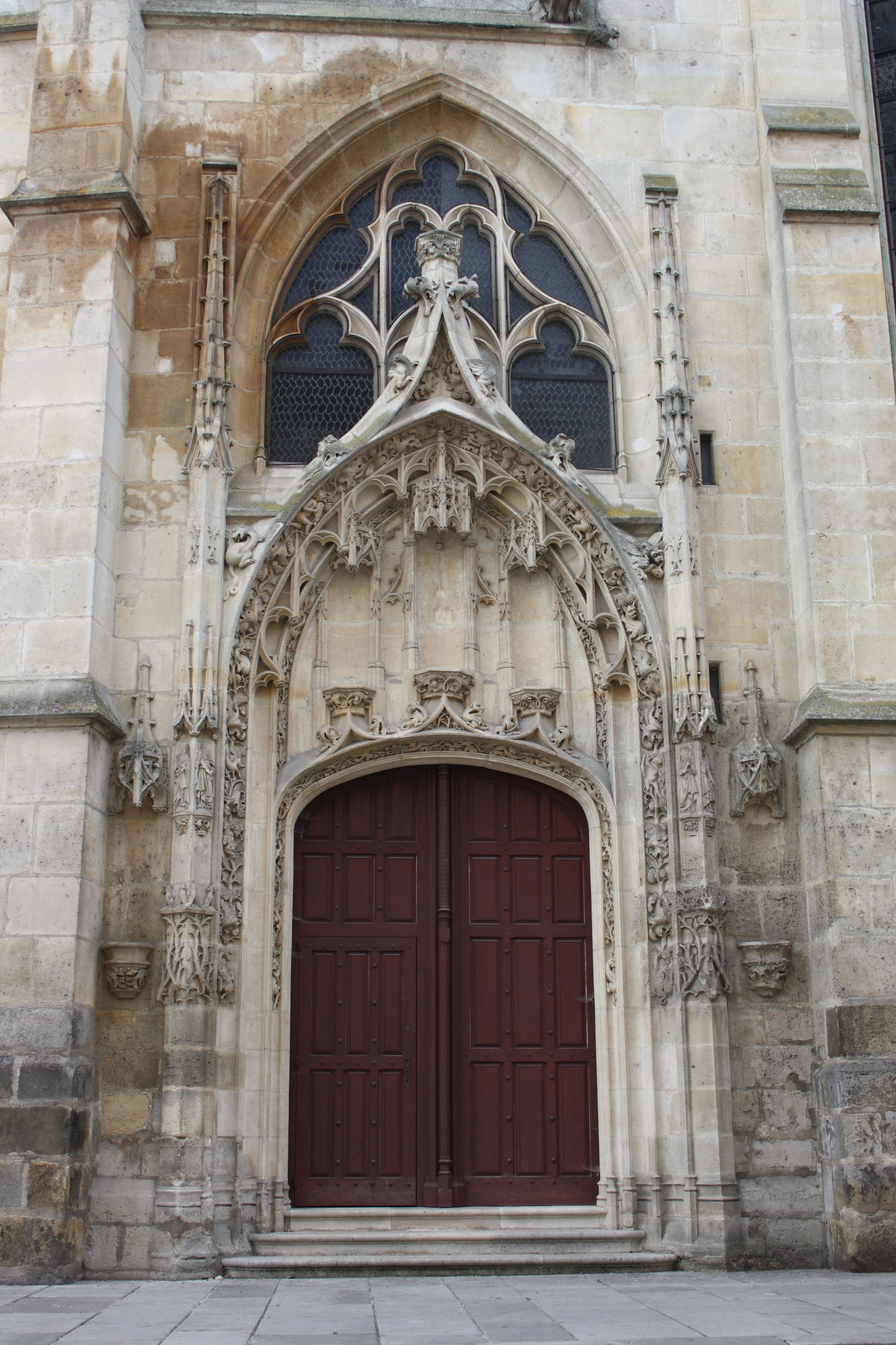 Katholische Pfarrkirche Saint-Aspais in Melun im Département Seine-et-Marne in der Region Île-de-France (Frankreich), linkes Seitenportal an der Rue Aspais